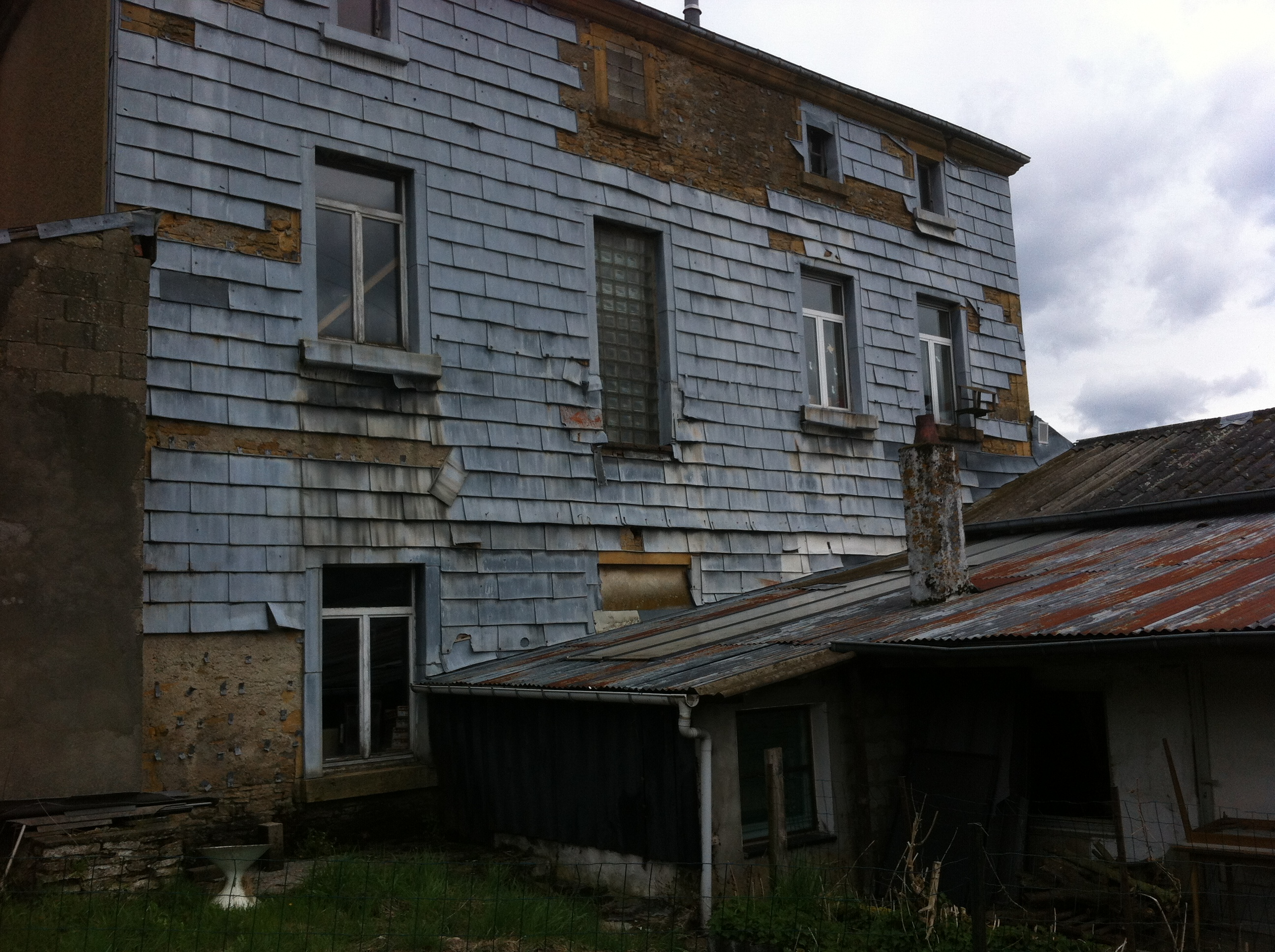 Vue de la façade arrière de l'école fondamentale libre confessionnelle de Villers-la-Loue.